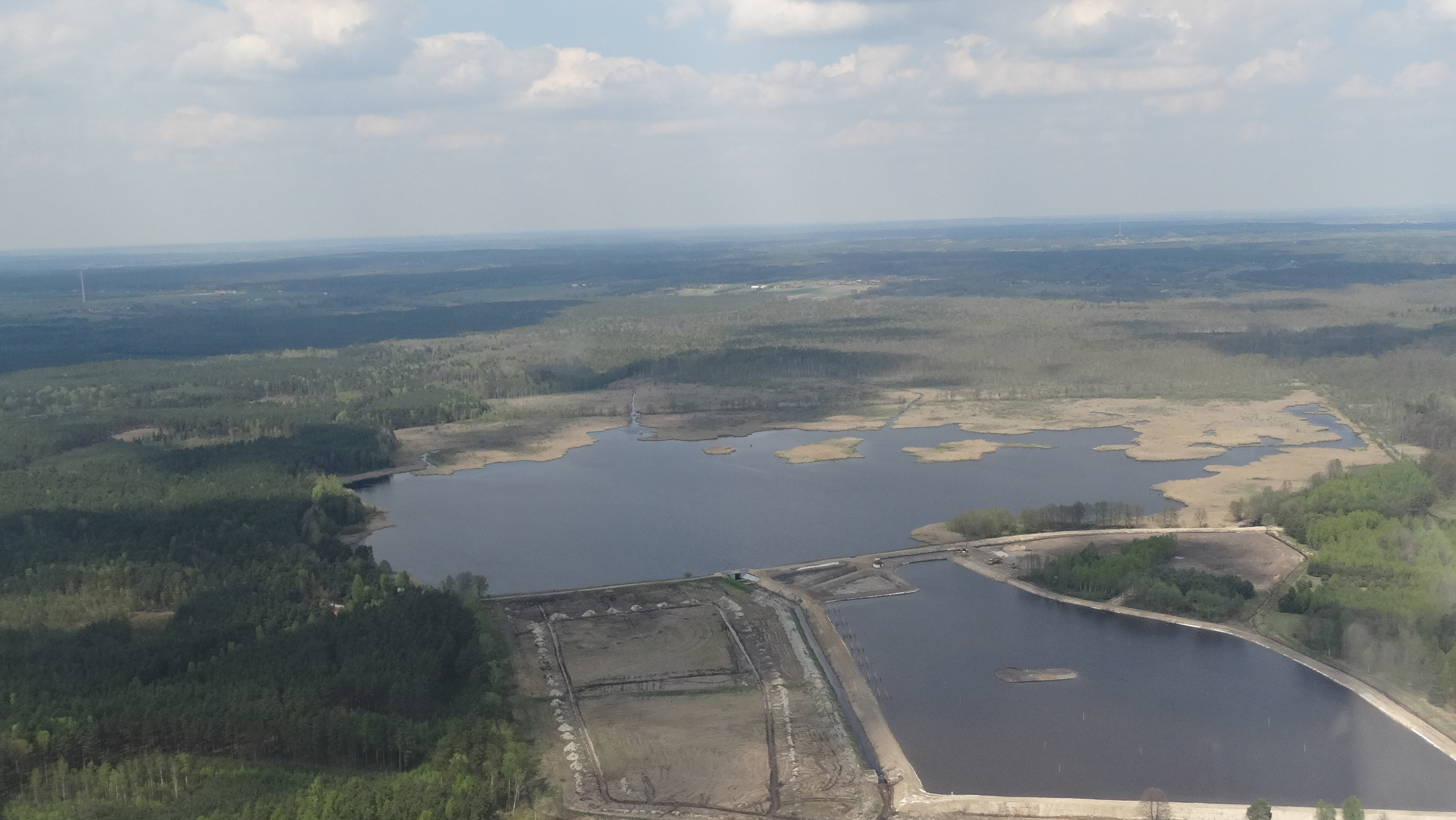 Stawy w Przedborskim Parku Krajobrazowym, Rezerwat Piskorzeniec.